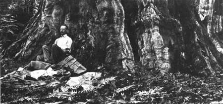 Gilbert Hovey Grosvenor, 1875-1966